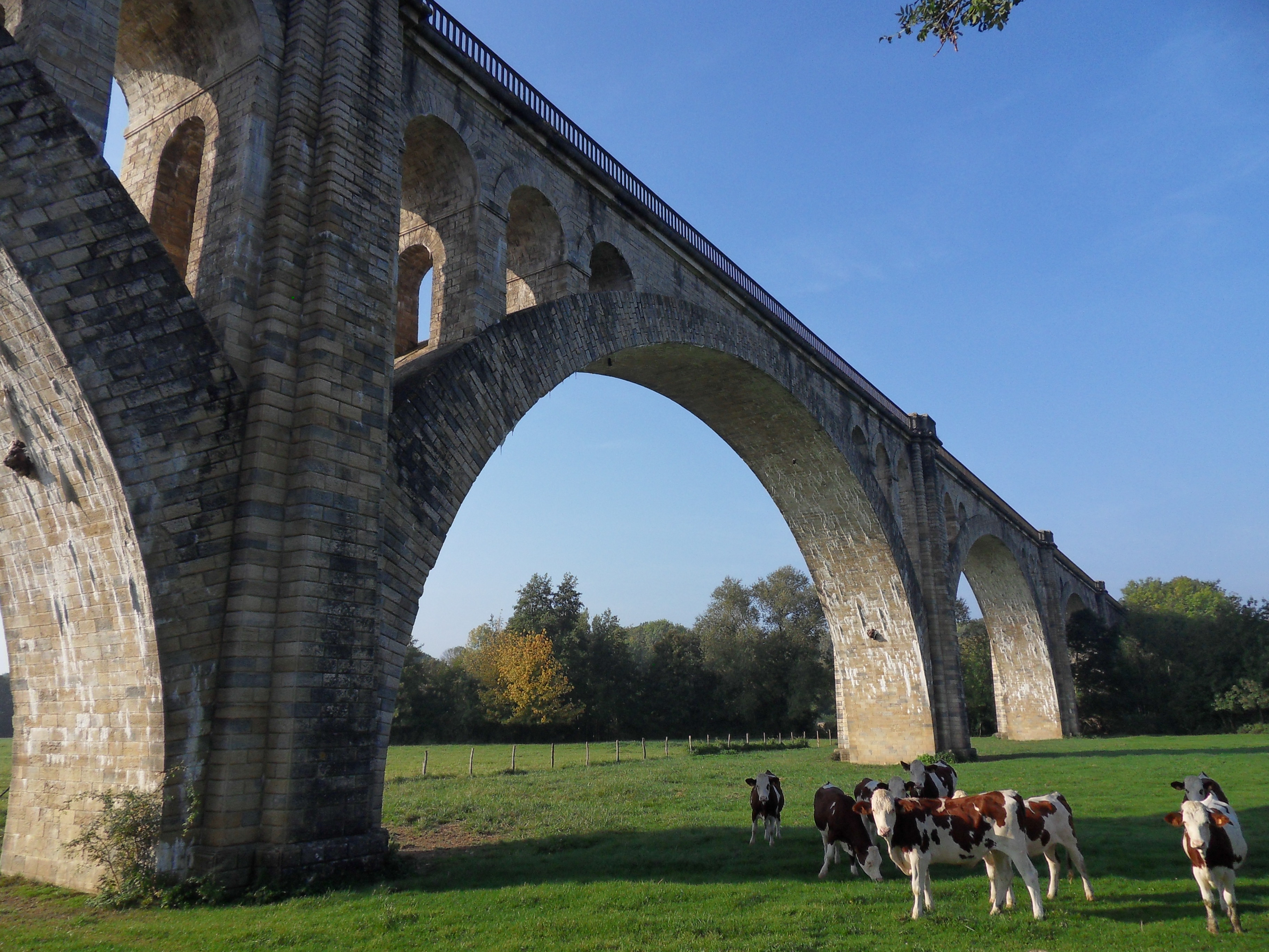 Oisilly, (Côte-d'Or) France. Le viaduc ferroviaire de la ligne désaffectée de Ligne de Saint-Julien à Gray